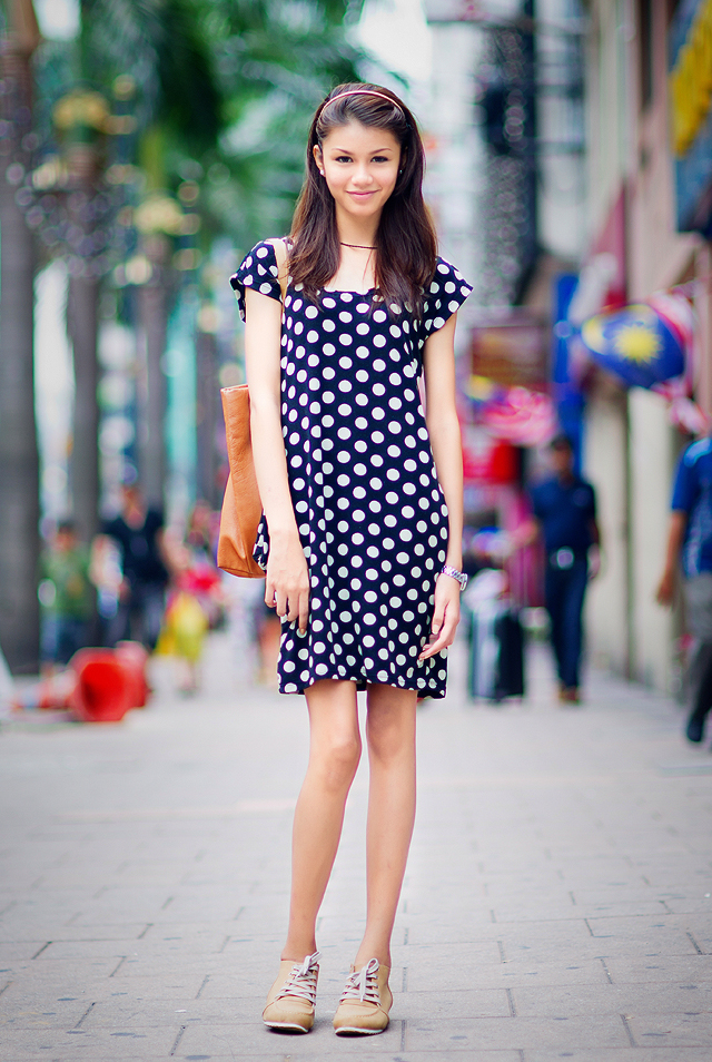 Mimi Lana